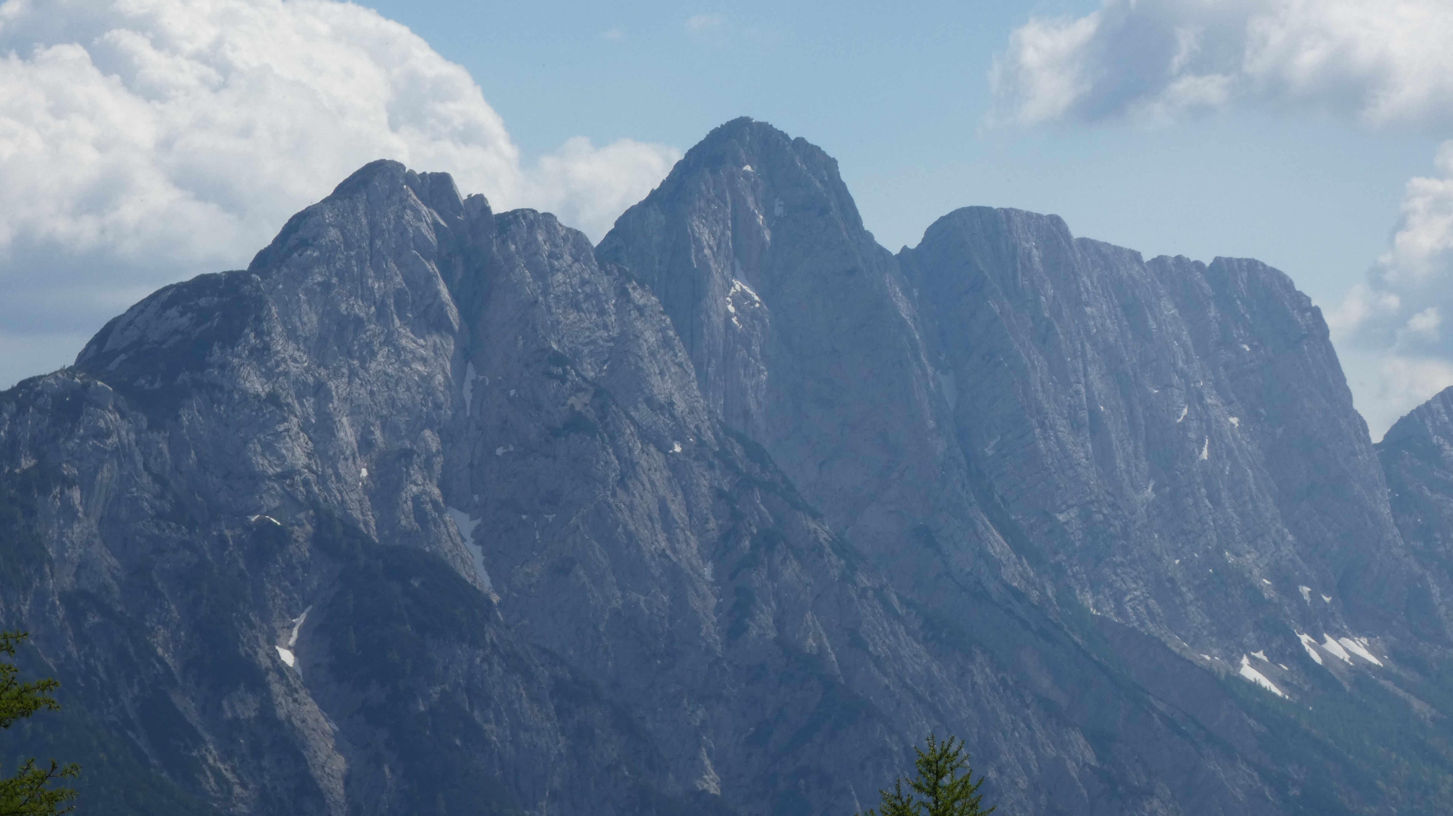 Trentski Pelc iz bližine Poštarskega doma na poti v vstop v Kopiščarjevo pot na Prisojnik